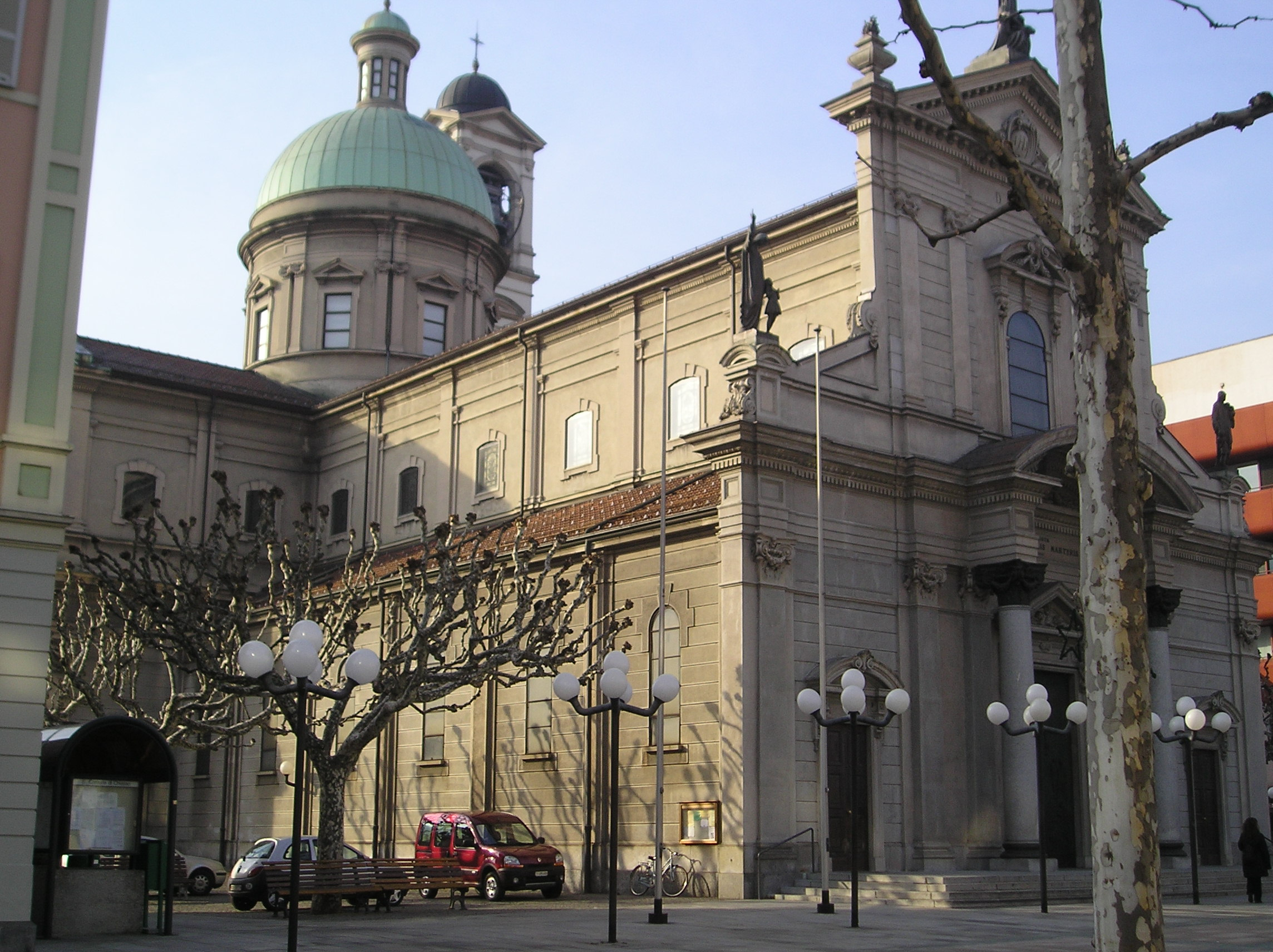 Questa foto rappresenta la chiesa di San Vitale a Chiasso, è stata scattata da me, G. Salluzzi a dicembre 2005 ed è rilasciata in Pubblico Dominio